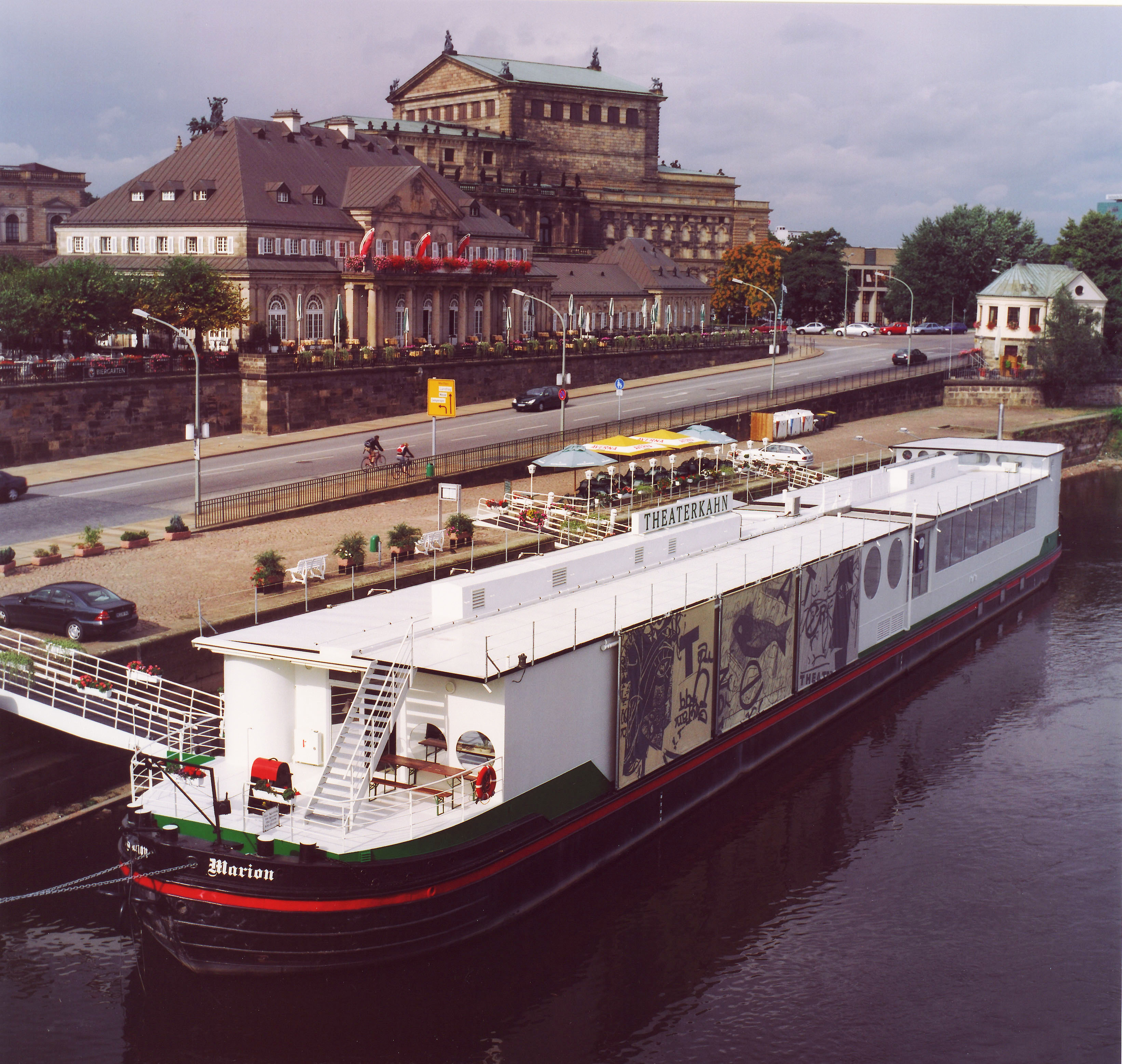 Der Dresdner Theaterkahn 2010